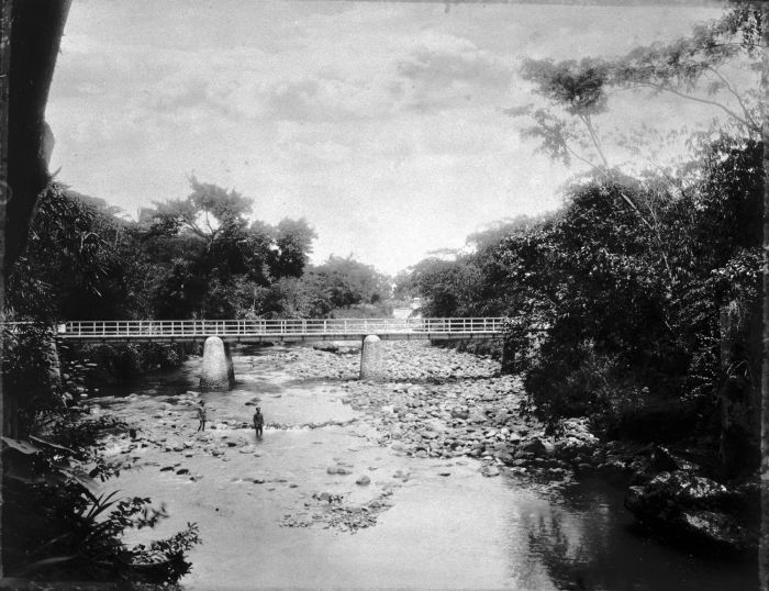 Foto. De brug over de Peloesrivier bij de badplaats Kedjawar vormt de verbinding tussen de suikerrietplantage Poerwokerto en het district Soekaradja.